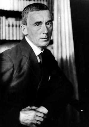 Retrato del poeta y ensayista Hugo Ball.